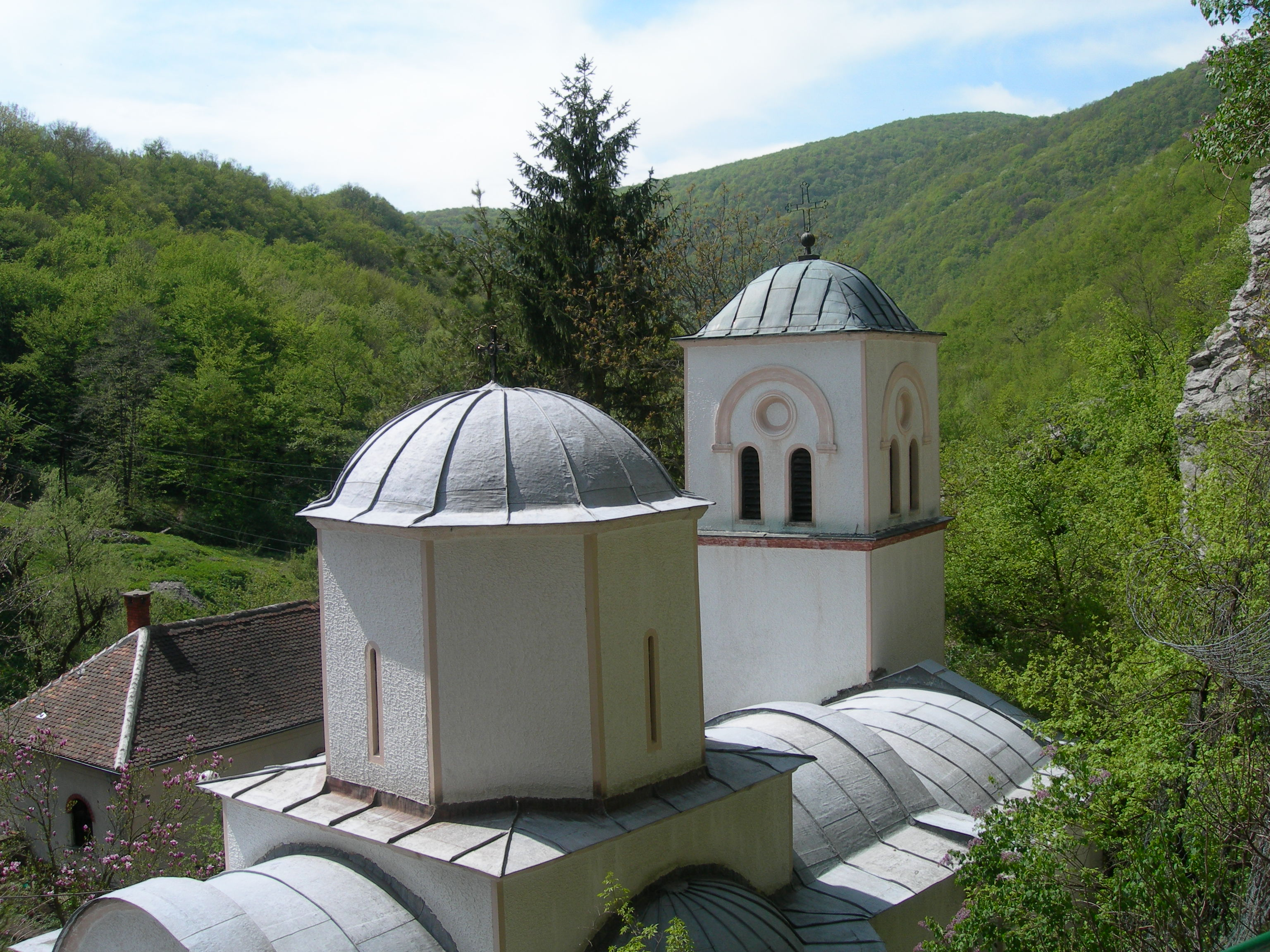 Manastir Gornjak